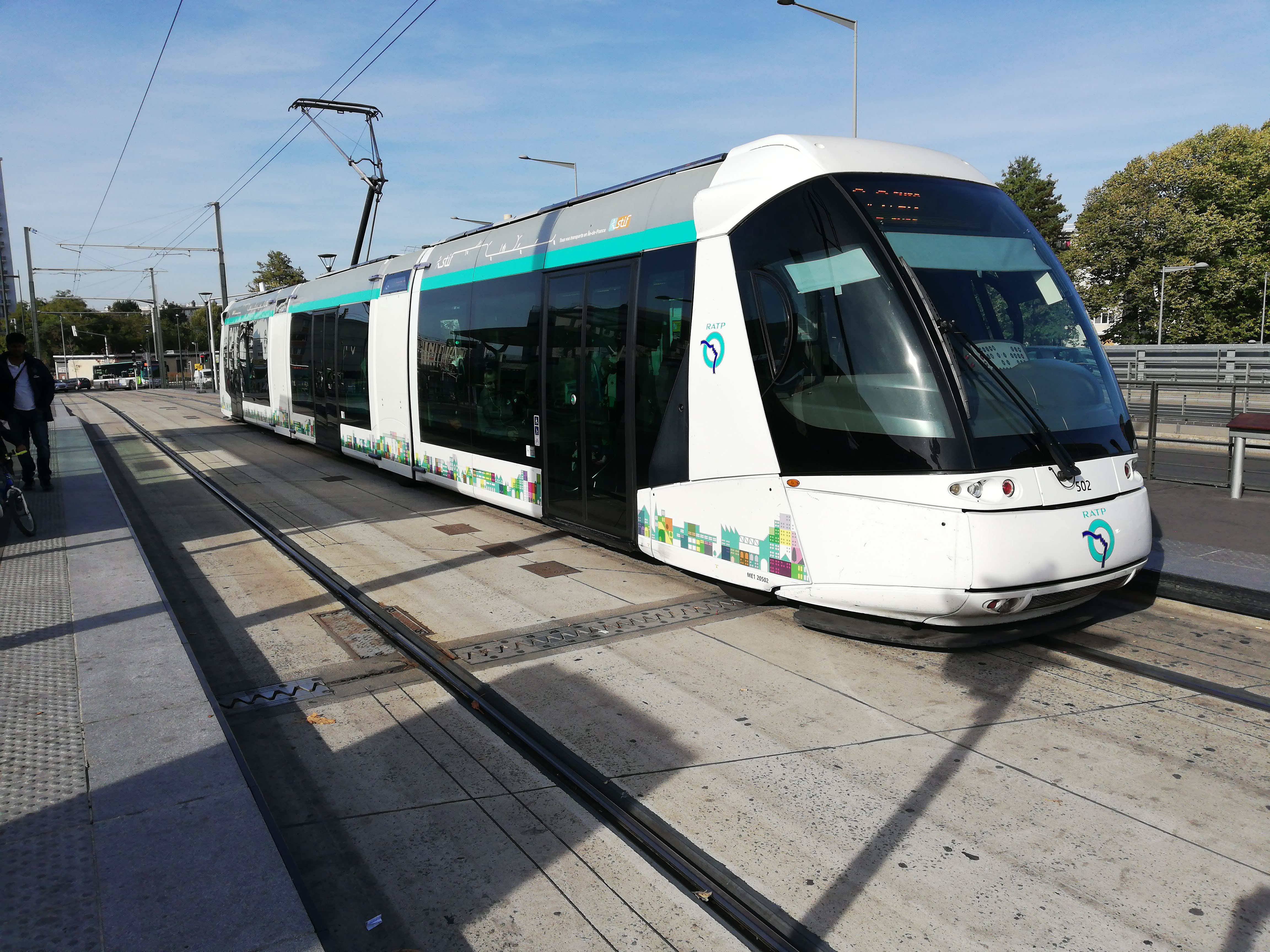 Translohr STE3 à la station T5 de Garges-Sarcelles, en 2018.